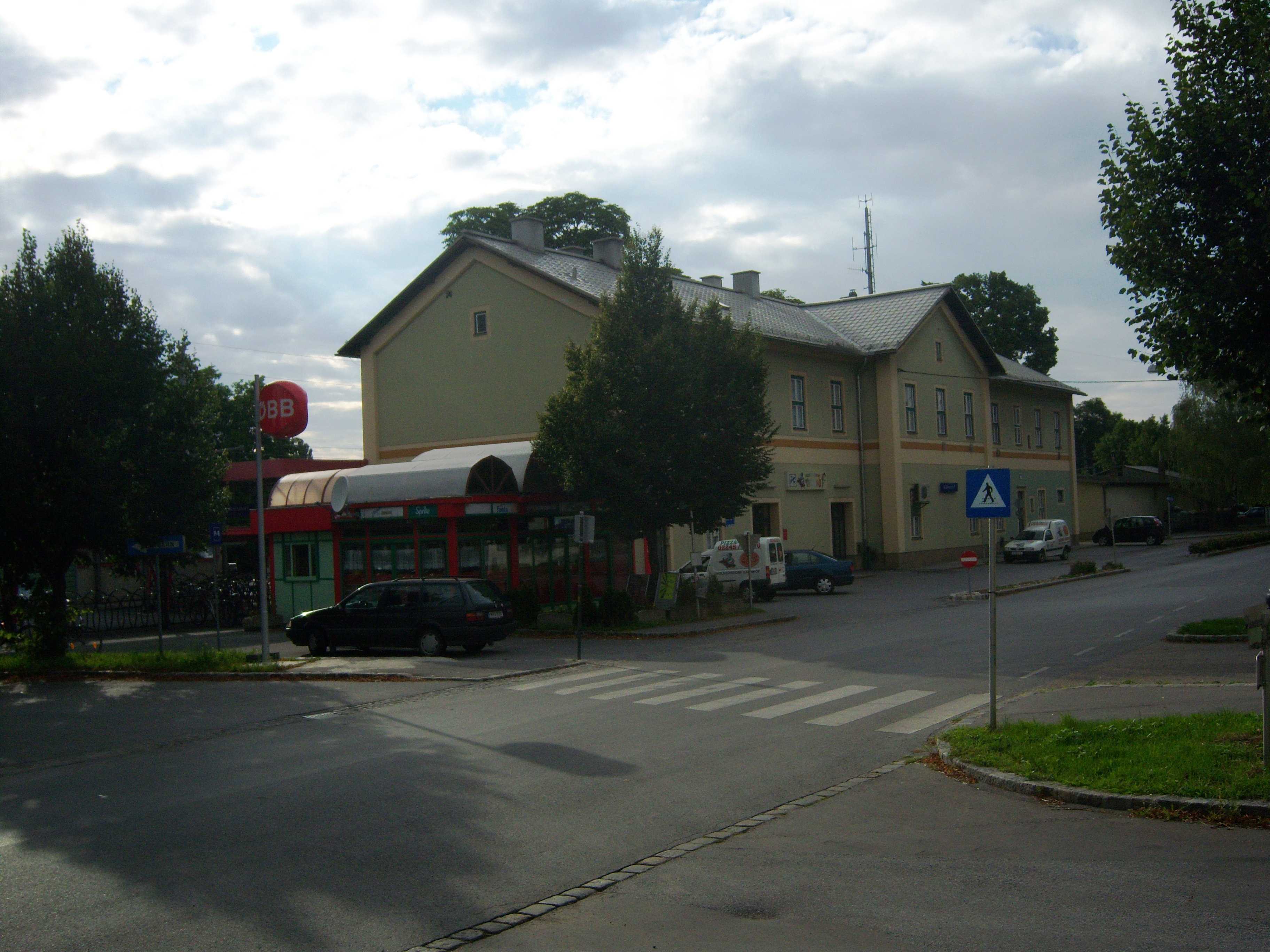 Bahnhofsgebäude Wolkersdorf